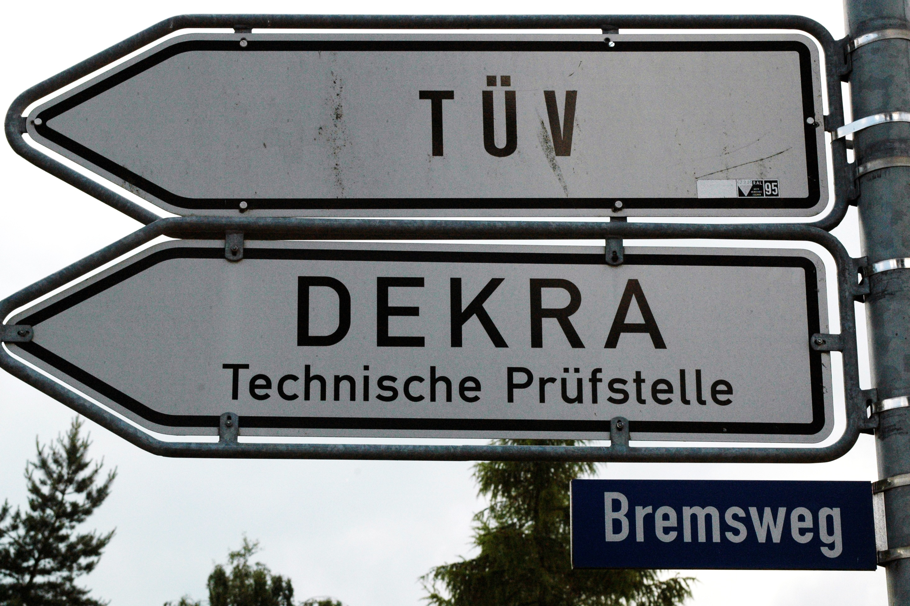 Der Bremsweg in Schwerin